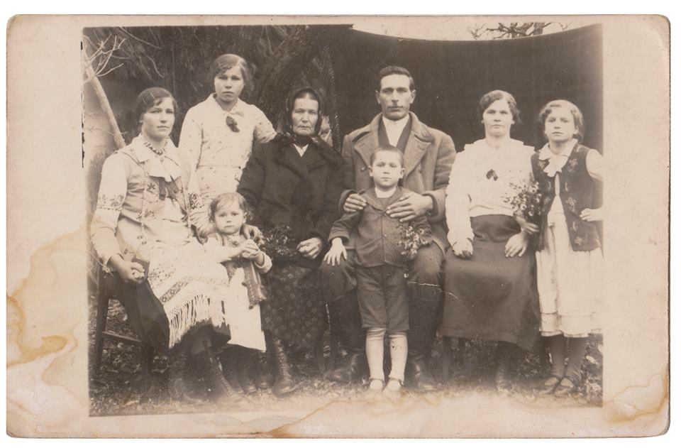 У центрі фото Ганна Підгорецька-Хміль (в чорній хустці) - померла в Брусні до 1946 року. Ліворуч від неї її син Петро Григорович Підгорецький (помер у вісімдесятих в Підгайчиках "на Мурованці"), його дружина Юлія з Шевчиків (померла в Підгайчиках "на Мурованці" в 1967 році), їхній син Петро (помер у Львові у кінці дев`яностих) та дочка Марія (доля невідома). Ліворуч стоять дочки Ганни - Катерина Підгорецька (вивезена з Брусна остарбайтером до Німеччини в 1944 році, там і залишилася, померла в 2011 році у Мюнхені) та Марія Підгорецька-Жуківець (померла в 1991 році в Підгайчиках). Біля Марії маленька донечка Ганна Підгорецька-Клосовська